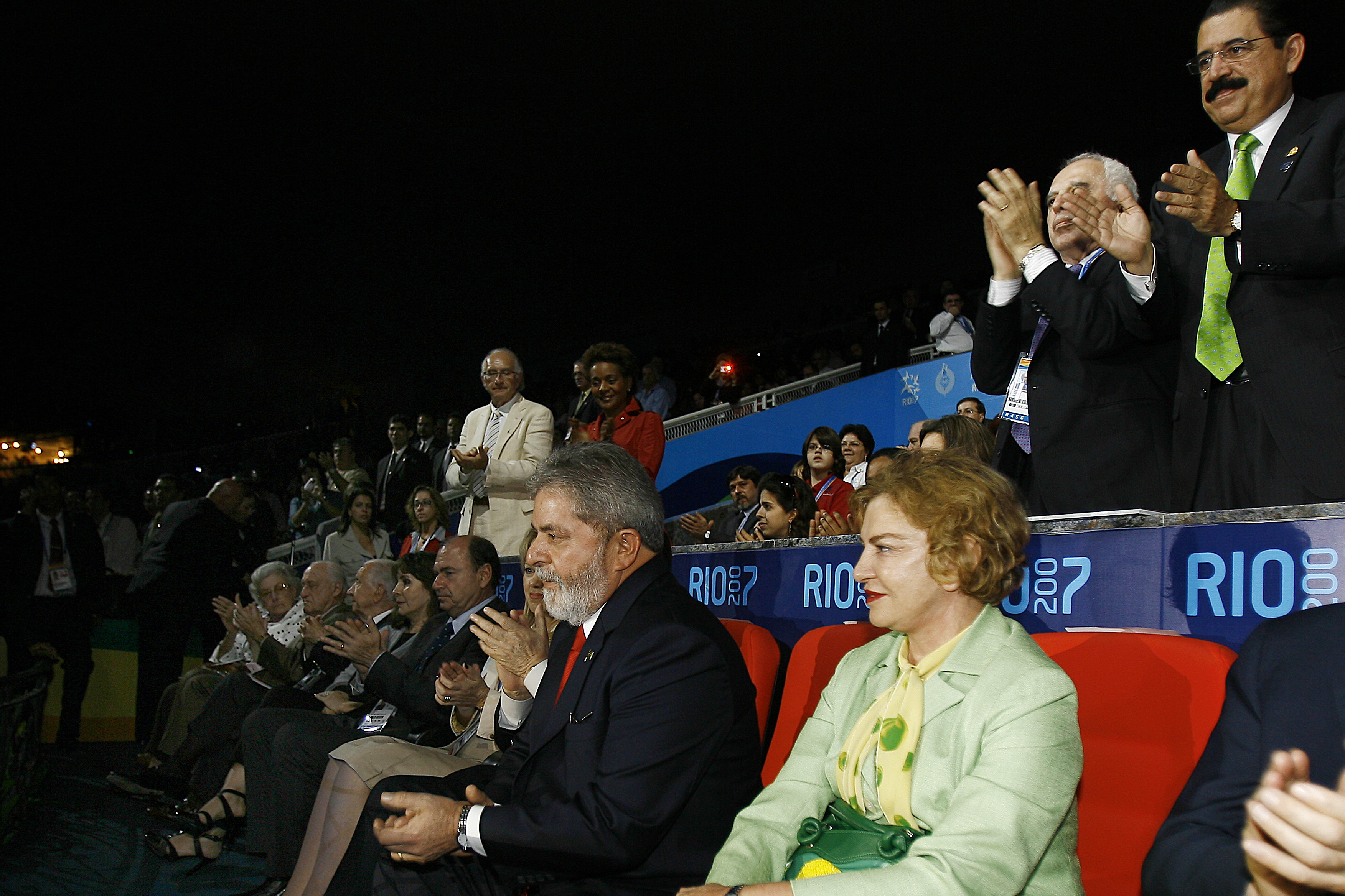 Rio de Janeiro - O presidente Luiz Inácio Lula da Silva acompanha à cerimônia de abertura dos Jogos Pan-Americanos Rio-2007.